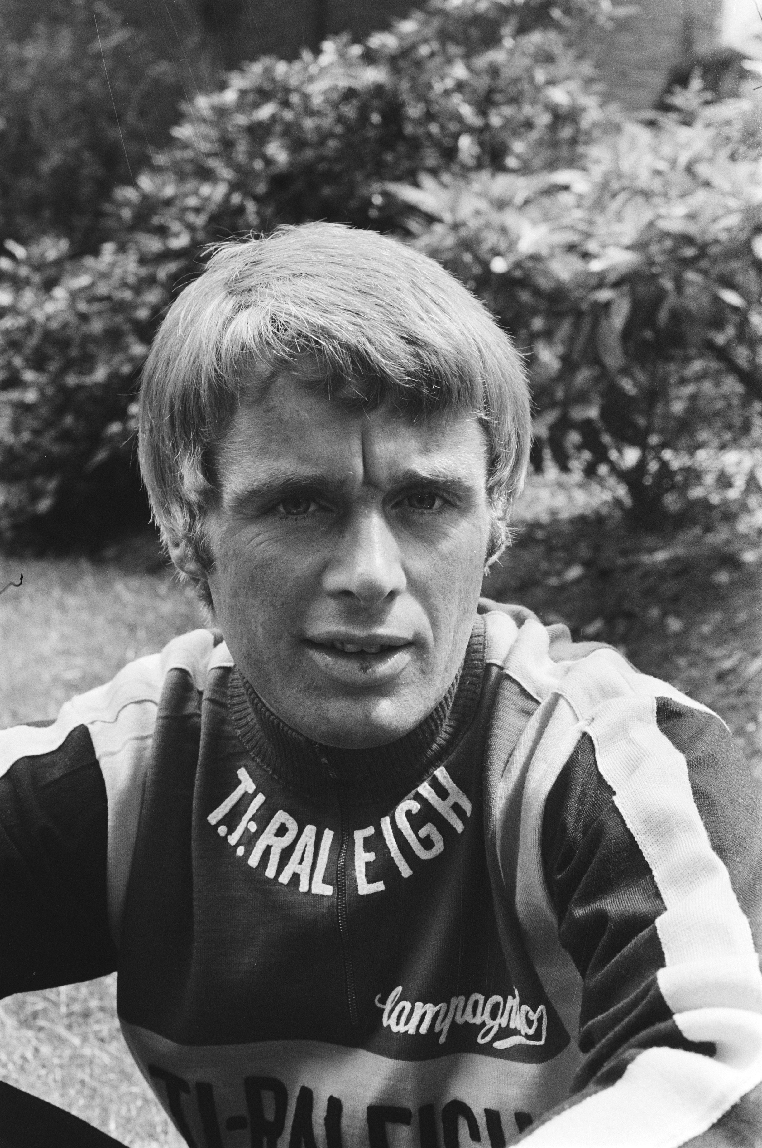 Collectie / Archief : Fotocollectie Anefo Reportage / Serie : [ onbekend ] Beschrijving : Presentatie Nederlandse wielerploegen Raleigh en Frisol, deelnemen aan Tour de France ; Hennie Kuiper (kop) Datum : 27 juni 1977 Trefwoorden : wielrennen Persoonsnaam : Hennie Kuiper Instellingsnaam : Tour de France Fotograaf : Verhoeff, Bert / Anefo Auteursrechthebbende : Nationaal Archief Materiaalsoort : Negatief (zwart/wit) Nummer archiefinventaris : bekijk toegang 2.24.01.05 Bestanddeelnummer : 929-2450